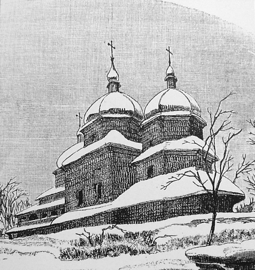 Церква в Роздолі. Рисунок Юліана Захаревича.